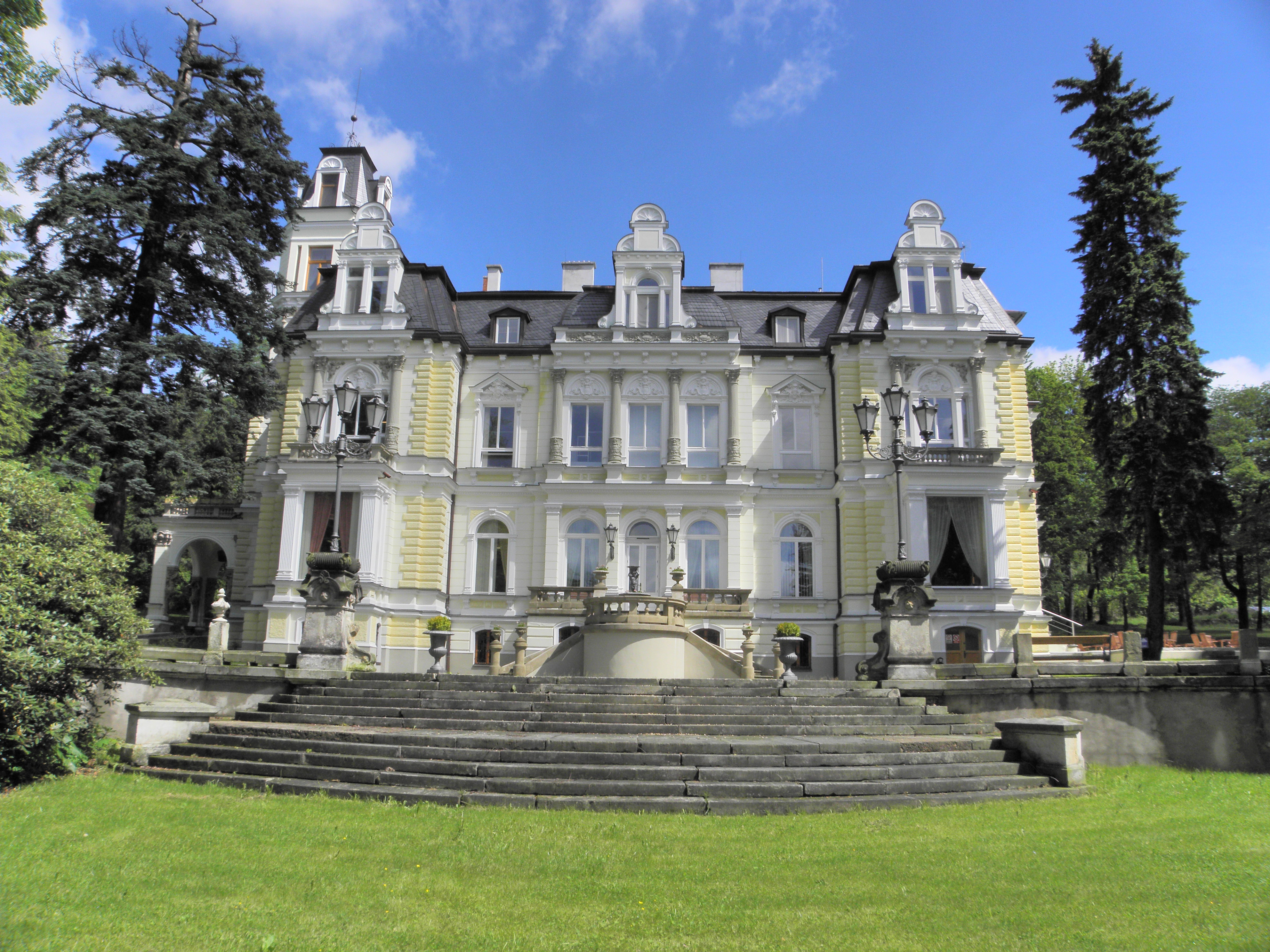 Südansicht der Villa Klinger nach den Renovierungsarbeiten, 2010